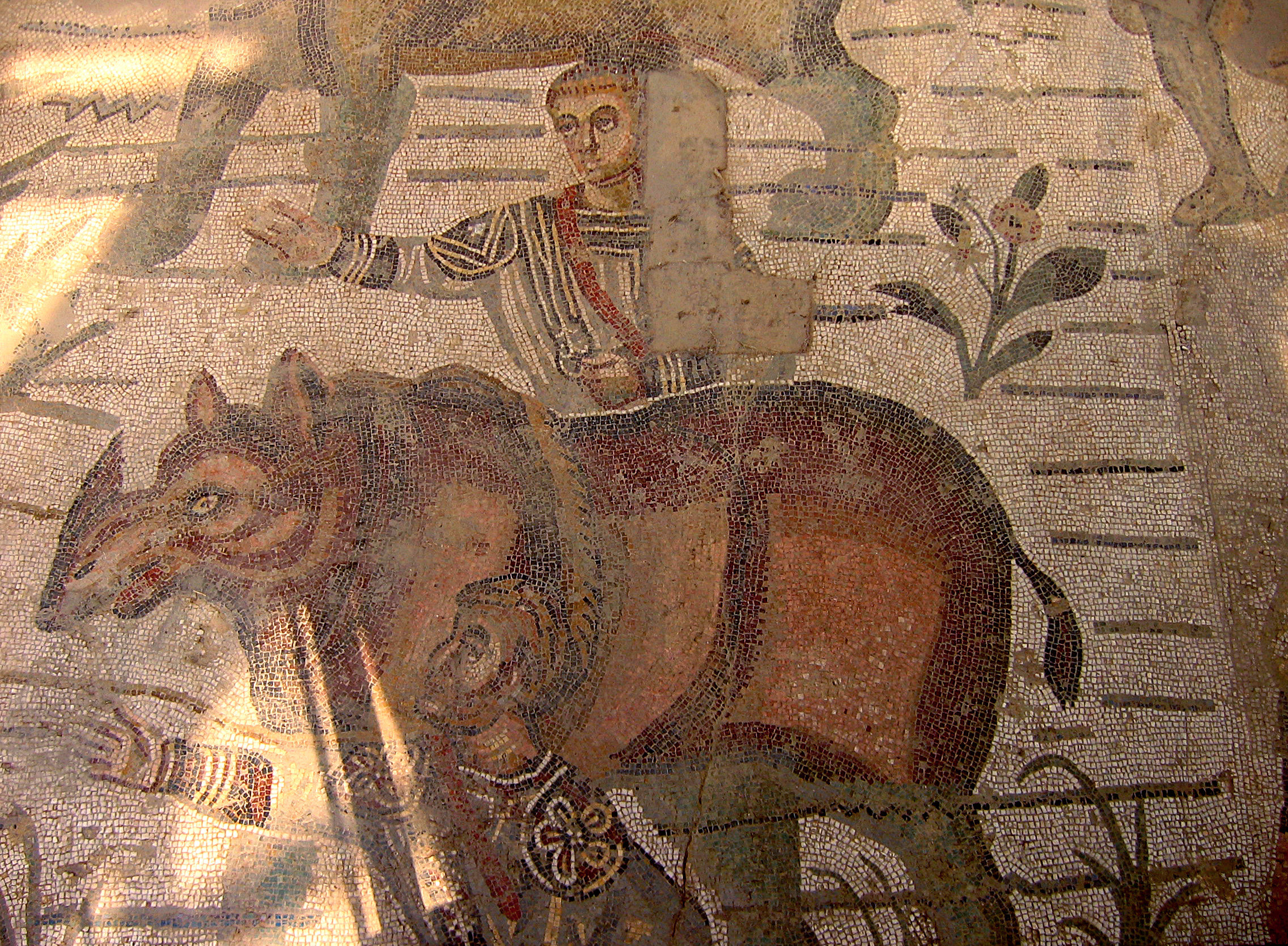 Roman mosaic at Villa del Casale, Sicilia